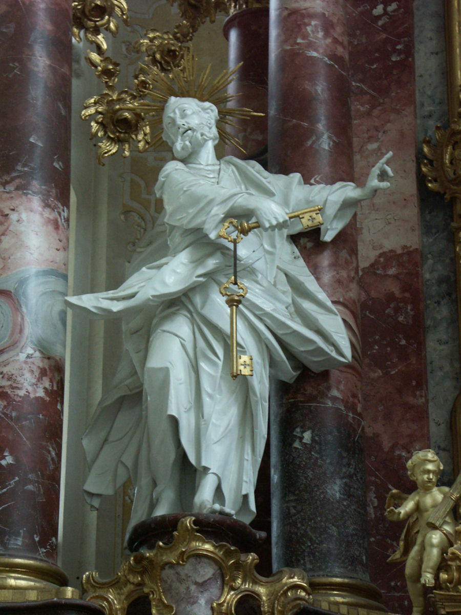 Schöntal Abbey, Schöntal, Germany